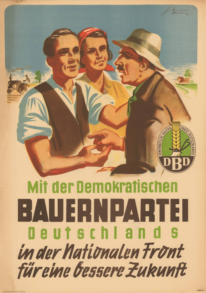 Mit der Demokratischen Bauernpartei Deutschlands in der Nationalen Front für eine bessere Zukunft Abbildung: Junges Bauernpaar im Gespräch mit älterem Bauer (Grafik) Plakatart: Motiv-/Textplakat Künstler_Grafiker: Horst Naumann, Dresden Drucker_Druckart_Druckort: Selcta-Druck GmbH D 31 6 50 30 42530/50 Objekt-Signatur: 10-024 : 1053 Bestand: Plakate aus der SBZ/DDR (10-024) GliederungBestand10-18: Demokratische Bauernpartei Deutschlands (DBD) Lizenz: KAS/ACDP 10-024 : 1053 CC-BY-SA 3.0 DE